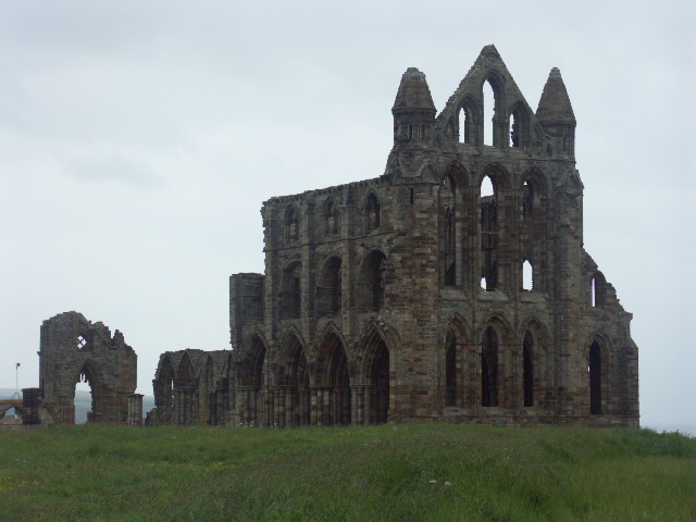 Author: Radovan Bahna, Slovak republic